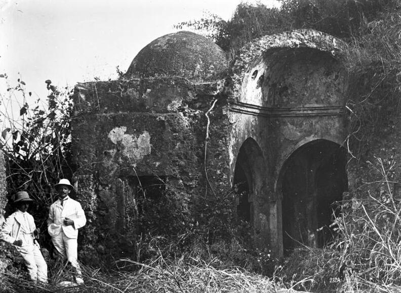 Kilwa Kissiwani, alte arabische Moschee